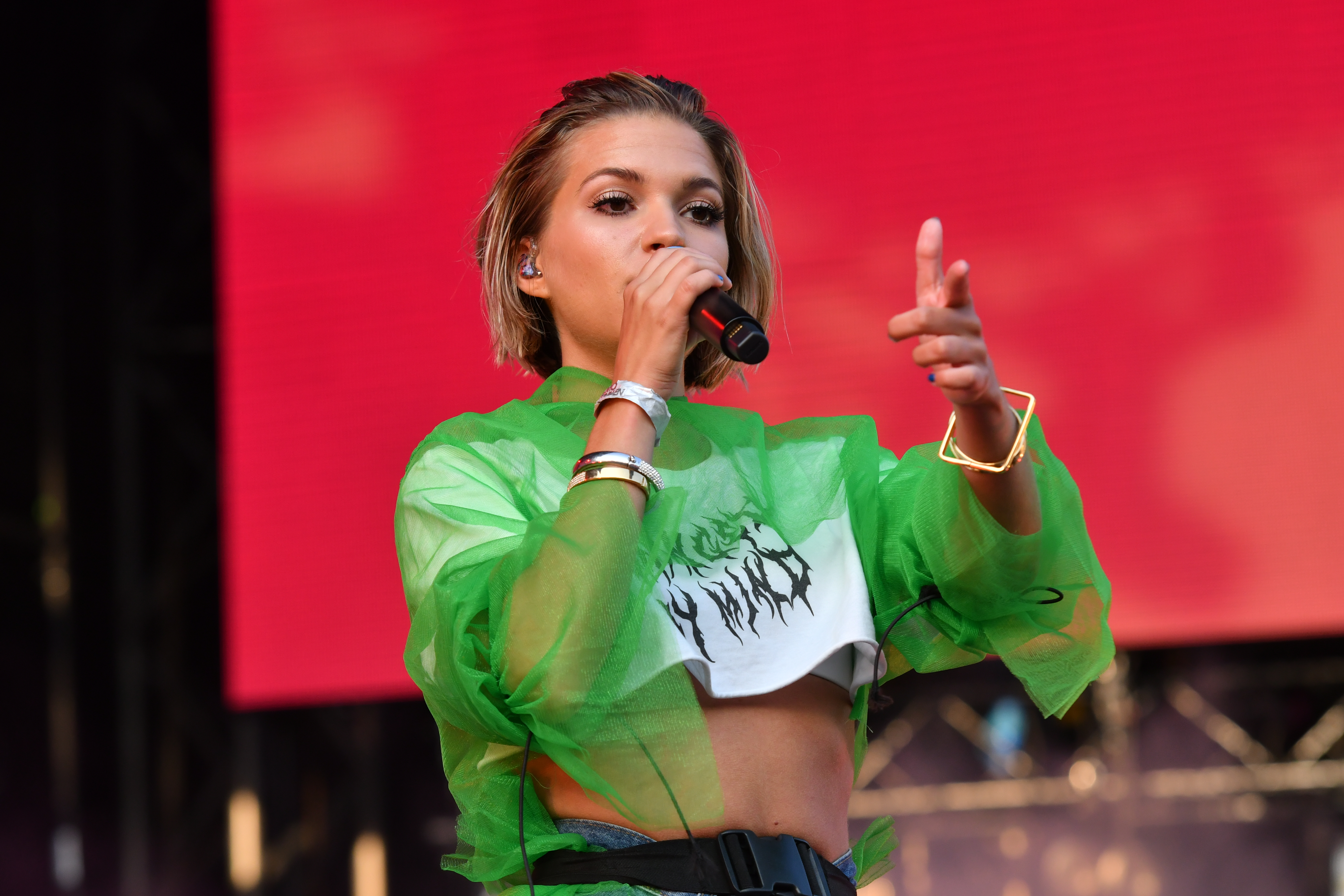 Tove Styrke på Malmöfestivalen 2018.